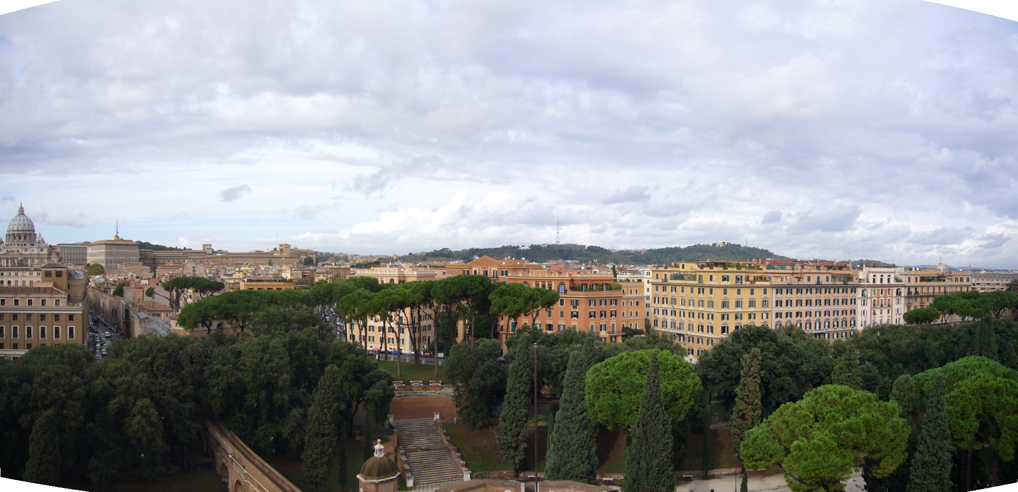 Roma. veduta del rione Prati da Castel Sant'Angelo